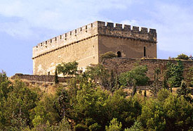 Foto del castillo de Gardeny